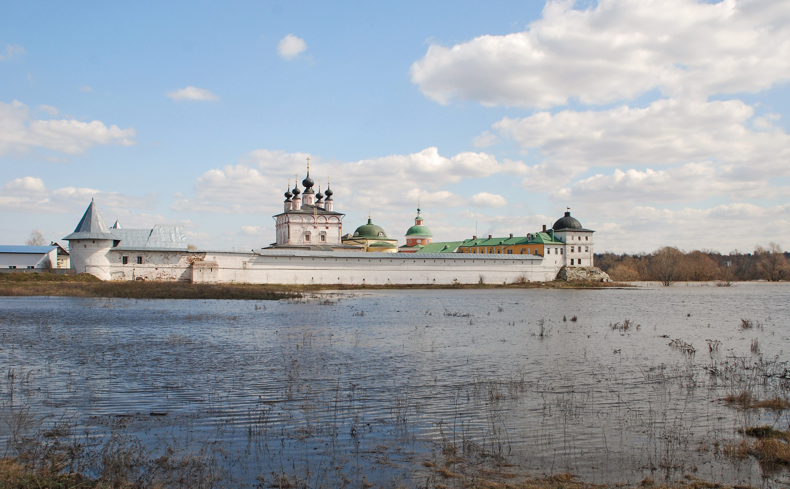 Белопесоцкий монастырь Церковь Иоанна Предтечи (Москва и Московская область, Ступино, посёлок Белопесоцкая слобода (ст. Белопесоцкая))